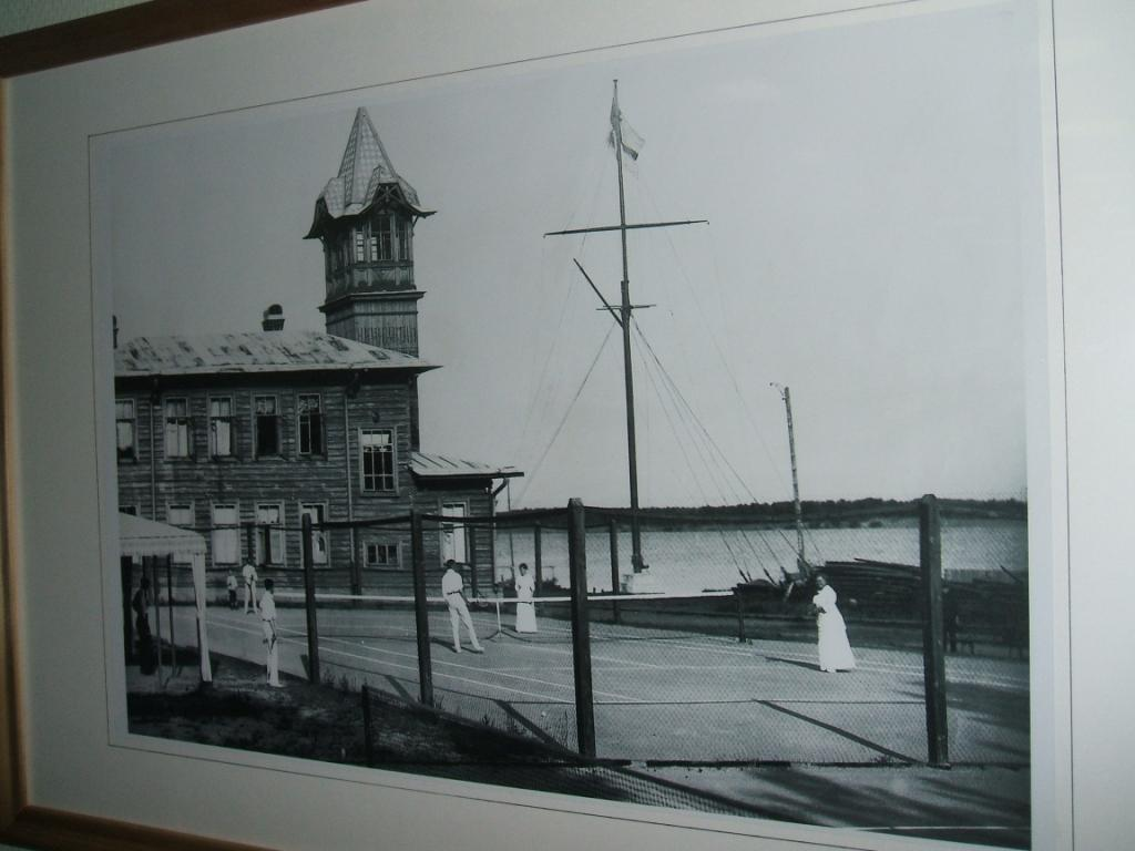 яхтклуб на Разливе до 1917 года